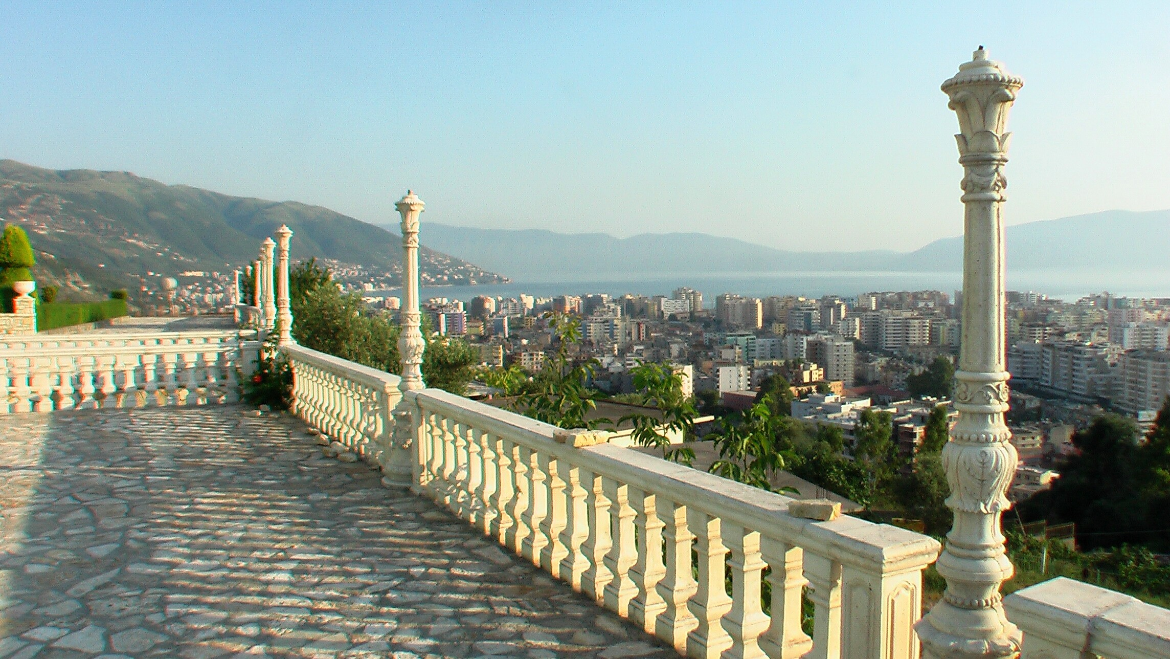 VlorëAnsicht1